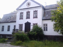 Komorno — dwór, XVIII/XIX w.